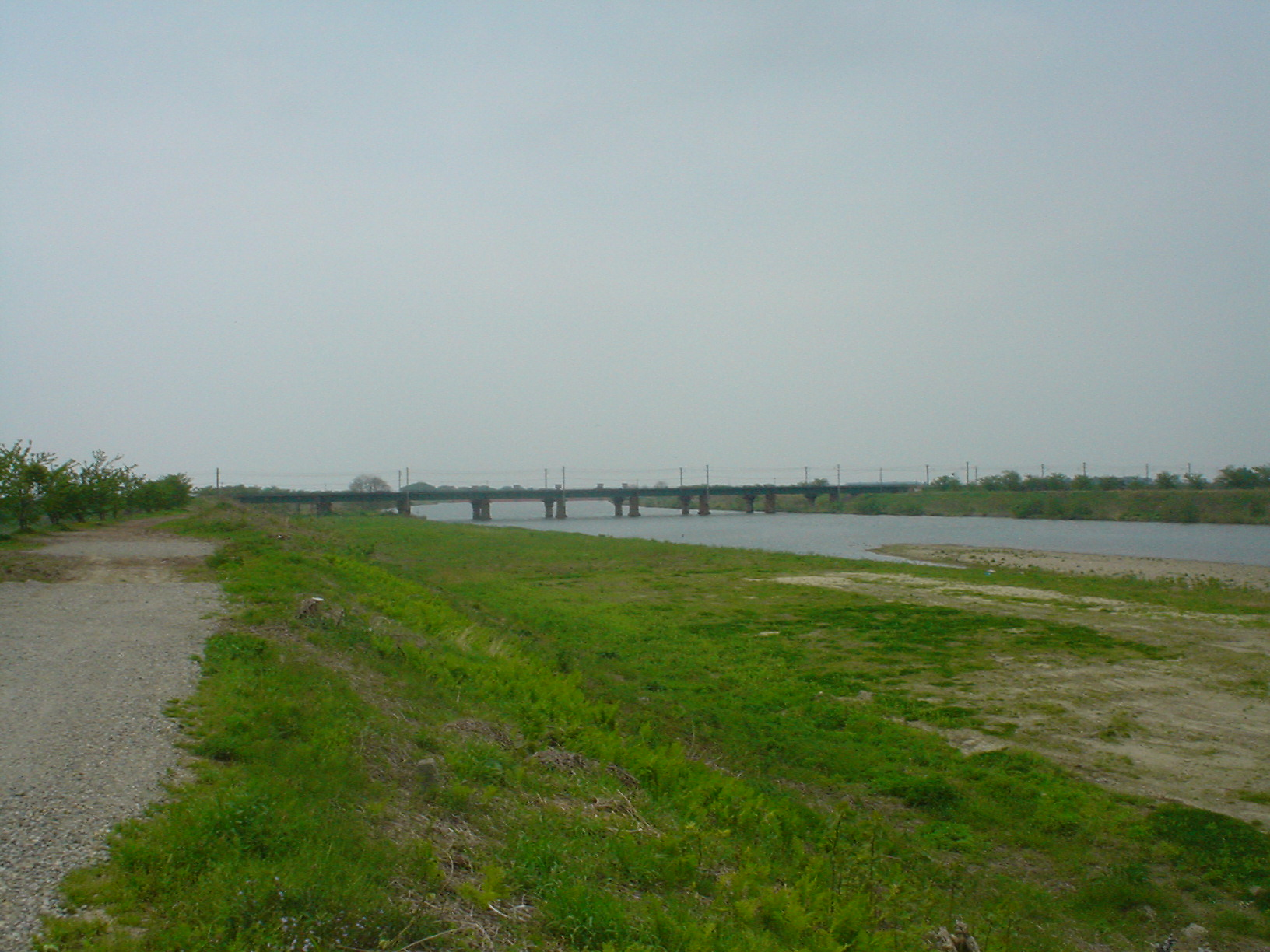 Kaji River in Niigata, Japan. ja: 加治川（新潟県新発田市島潟より下流のJR羽越本線鉄道橋）